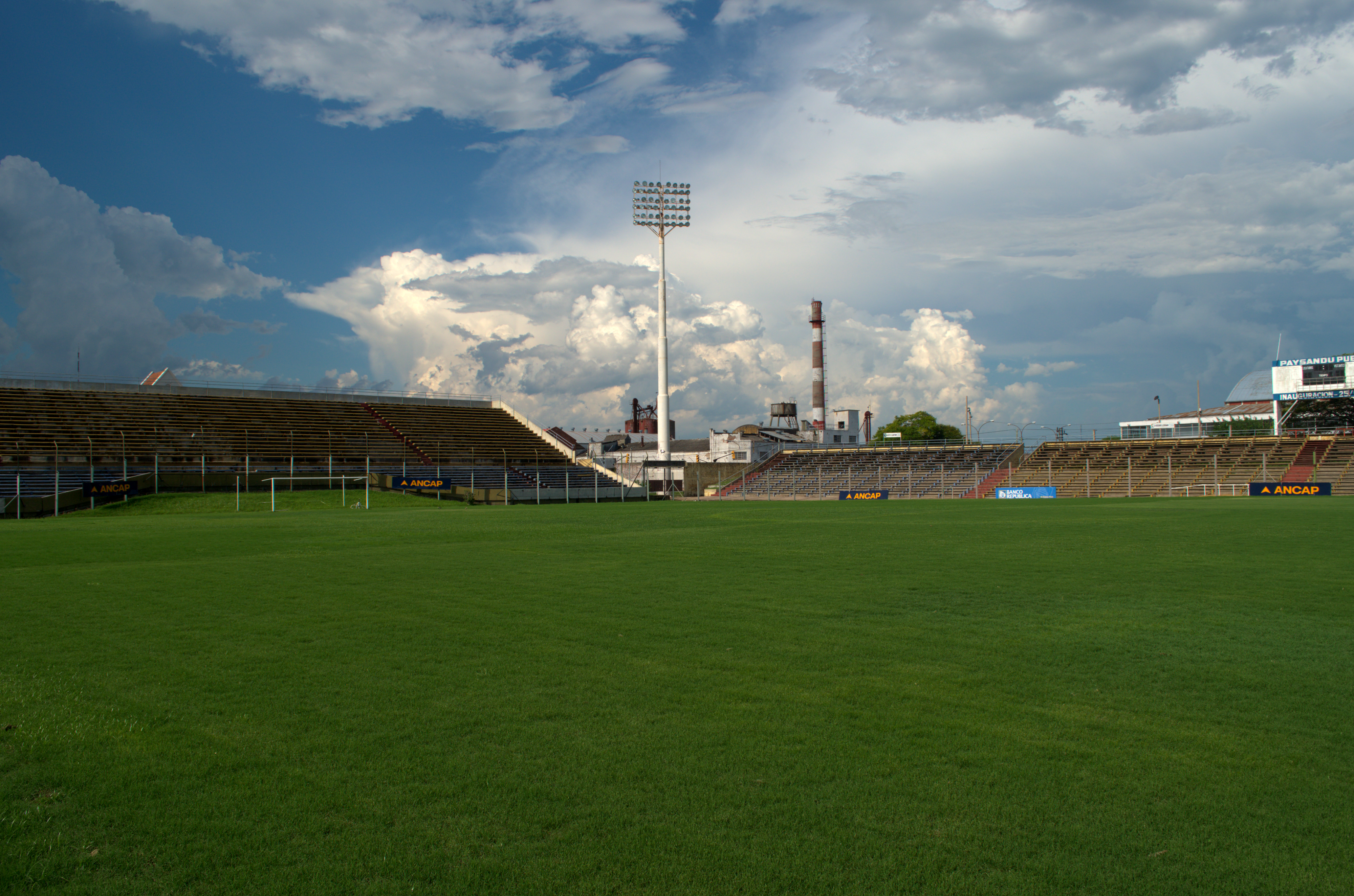 Imagen del Estadio Parque Artigas de Paysandú